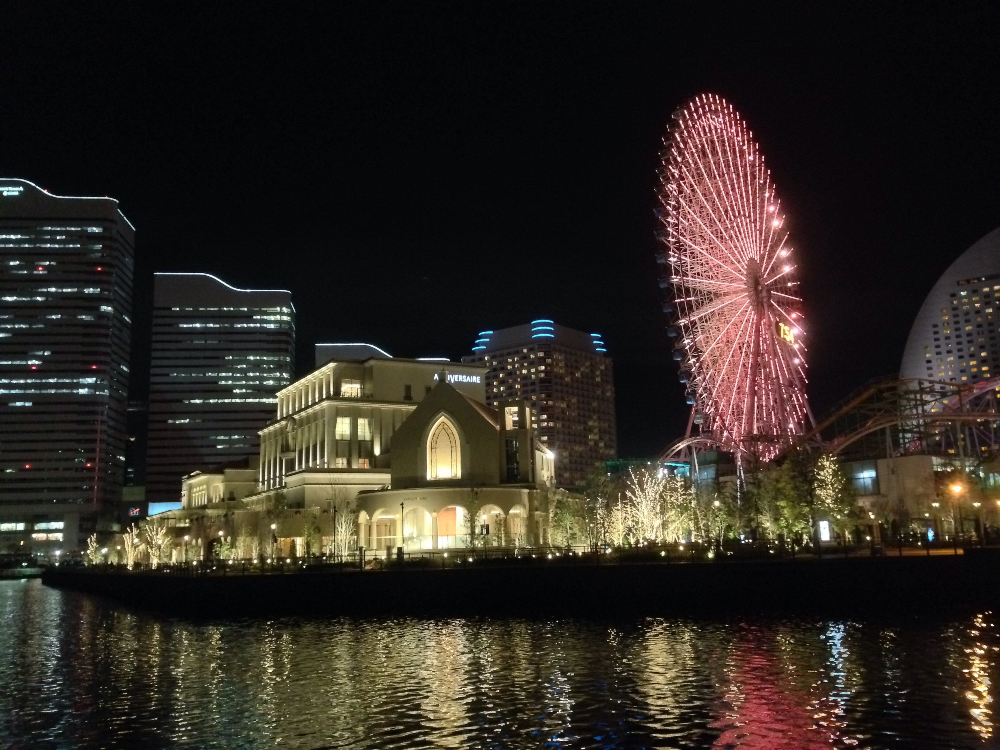 アニヴェルセル みなとみらい横浜の外観と観覧車コスモクロック。